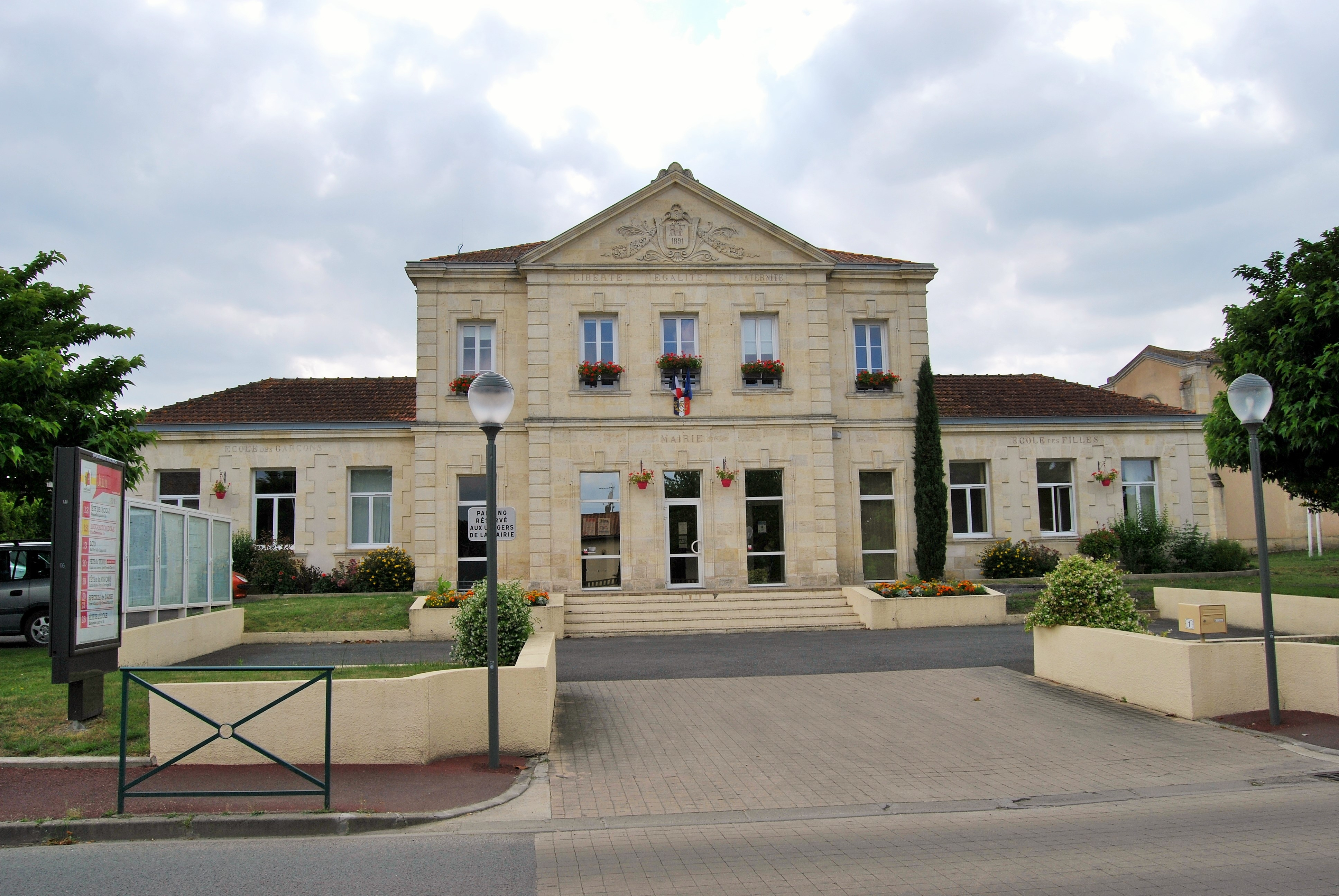 Montussan Mairie